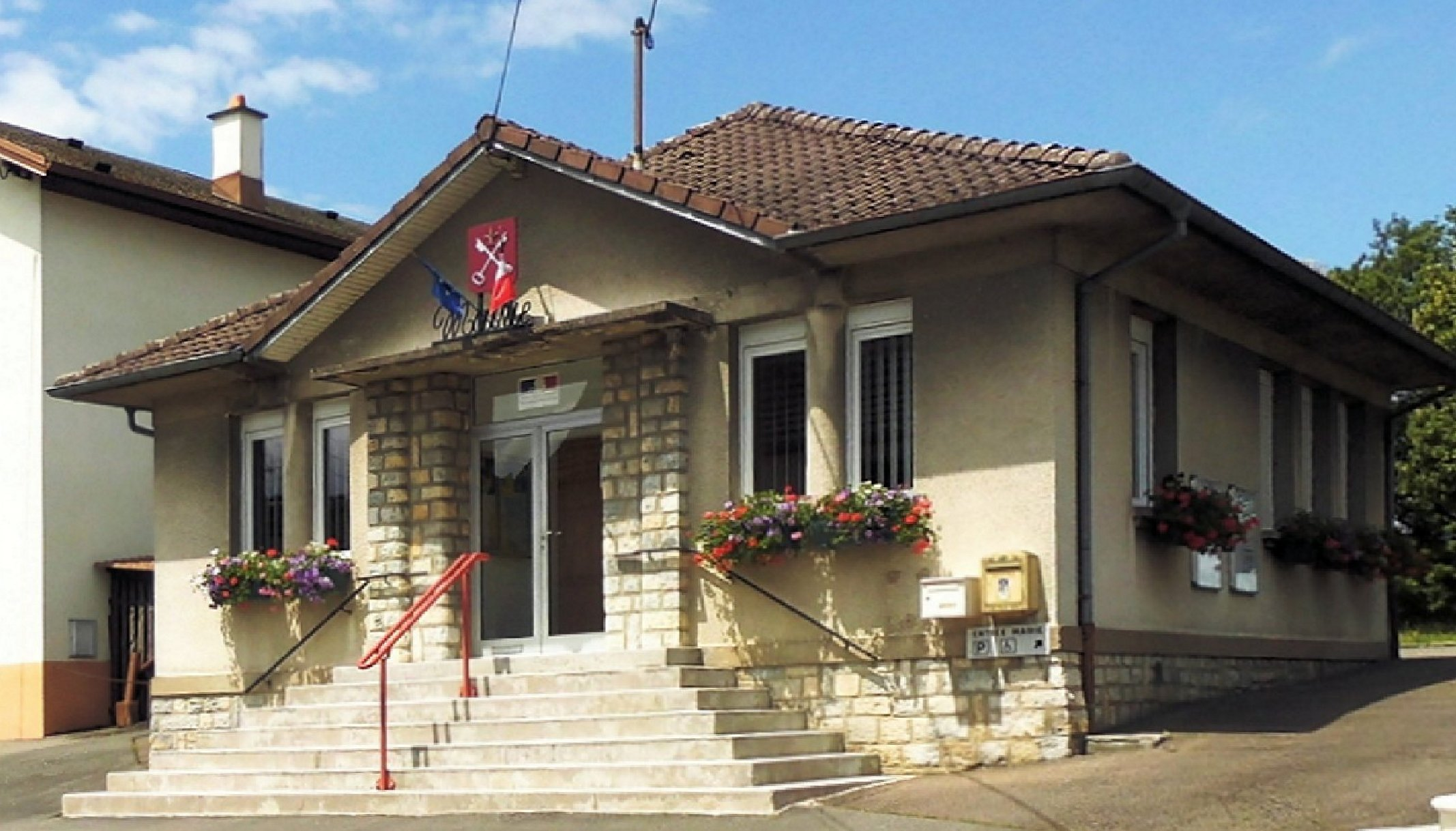 La mairie de Dampierre-sur-le-Doubs